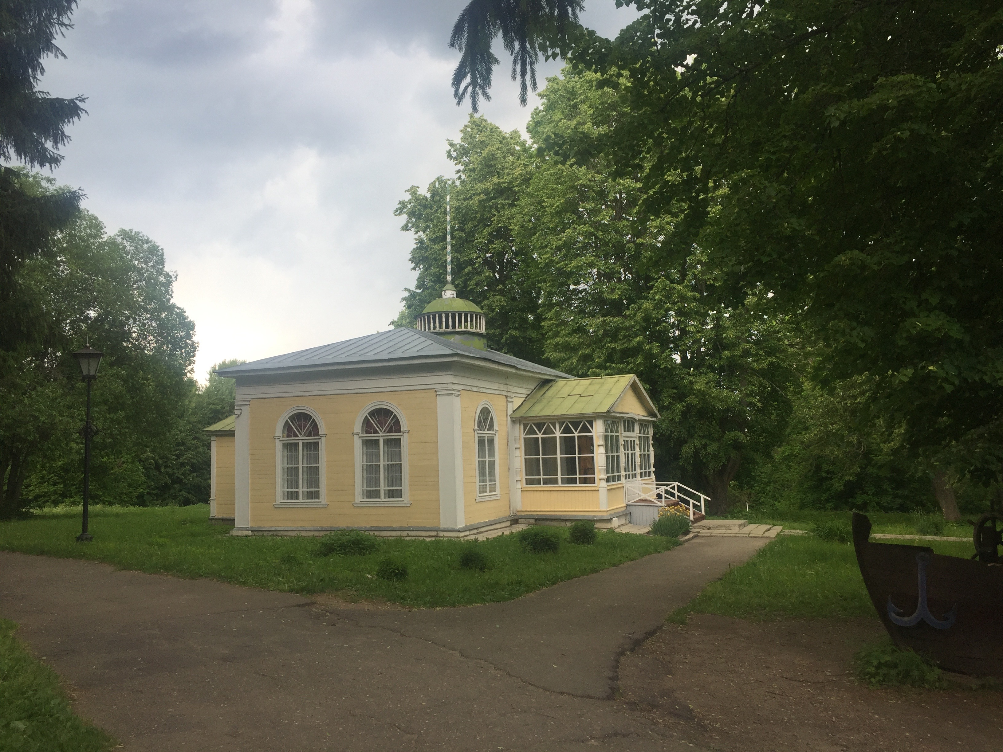 Ротонда.